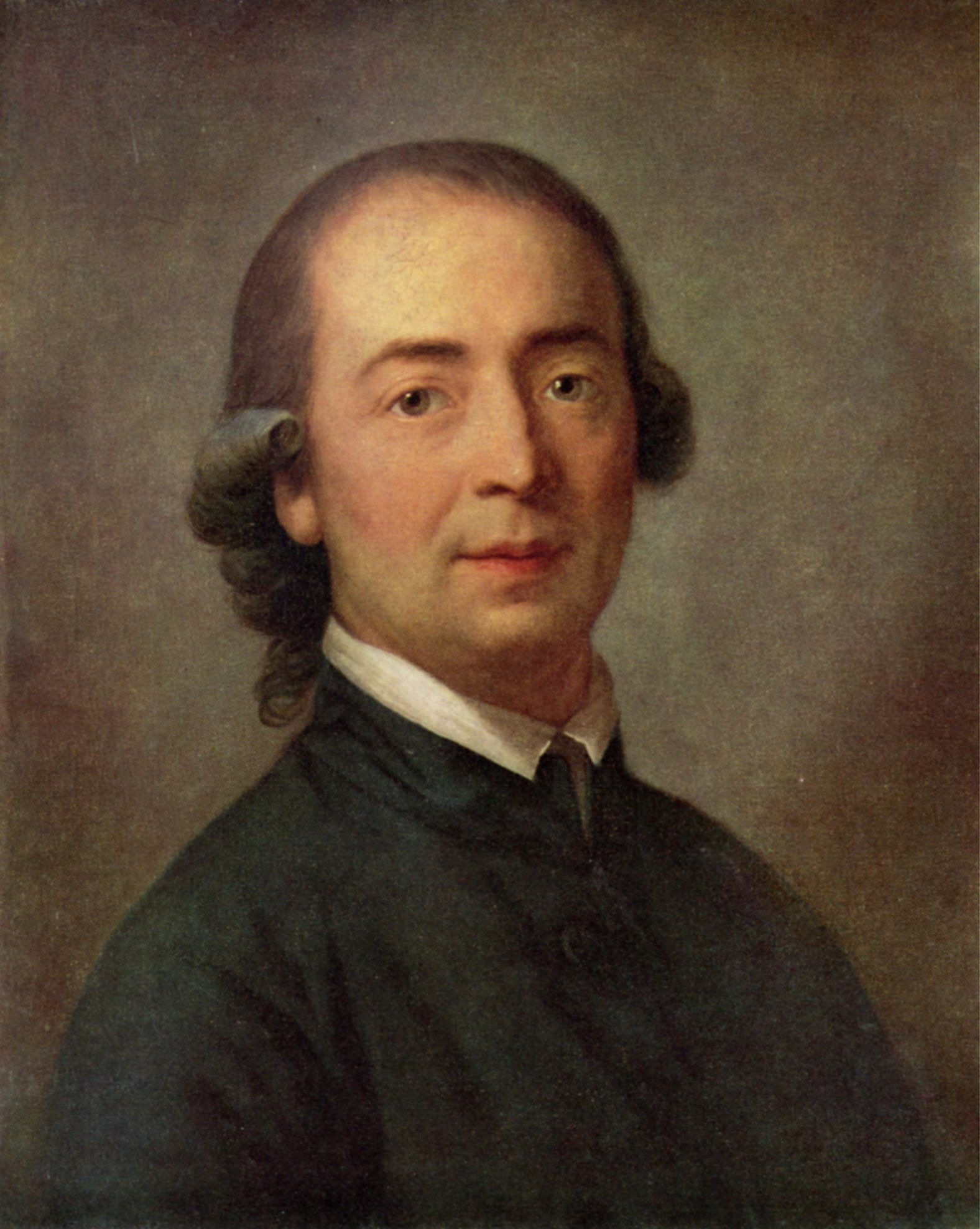 Portrait of Johann Gottfried Herder